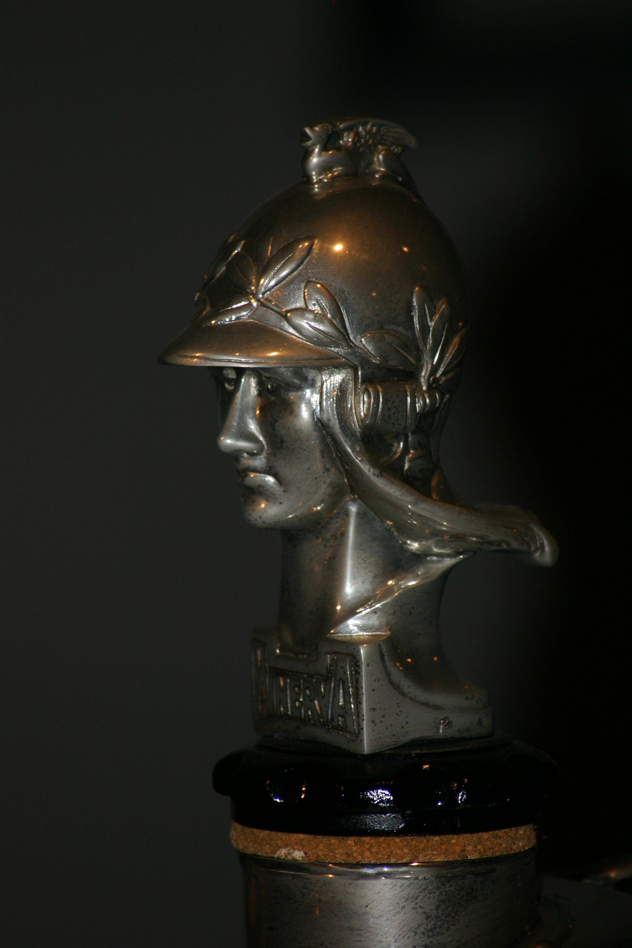 Radiator Mascotte Minerva